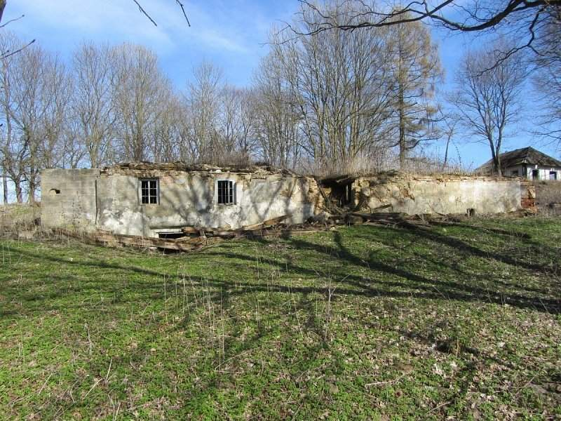 Чыжыноўцы. Рэшткі сядзібы